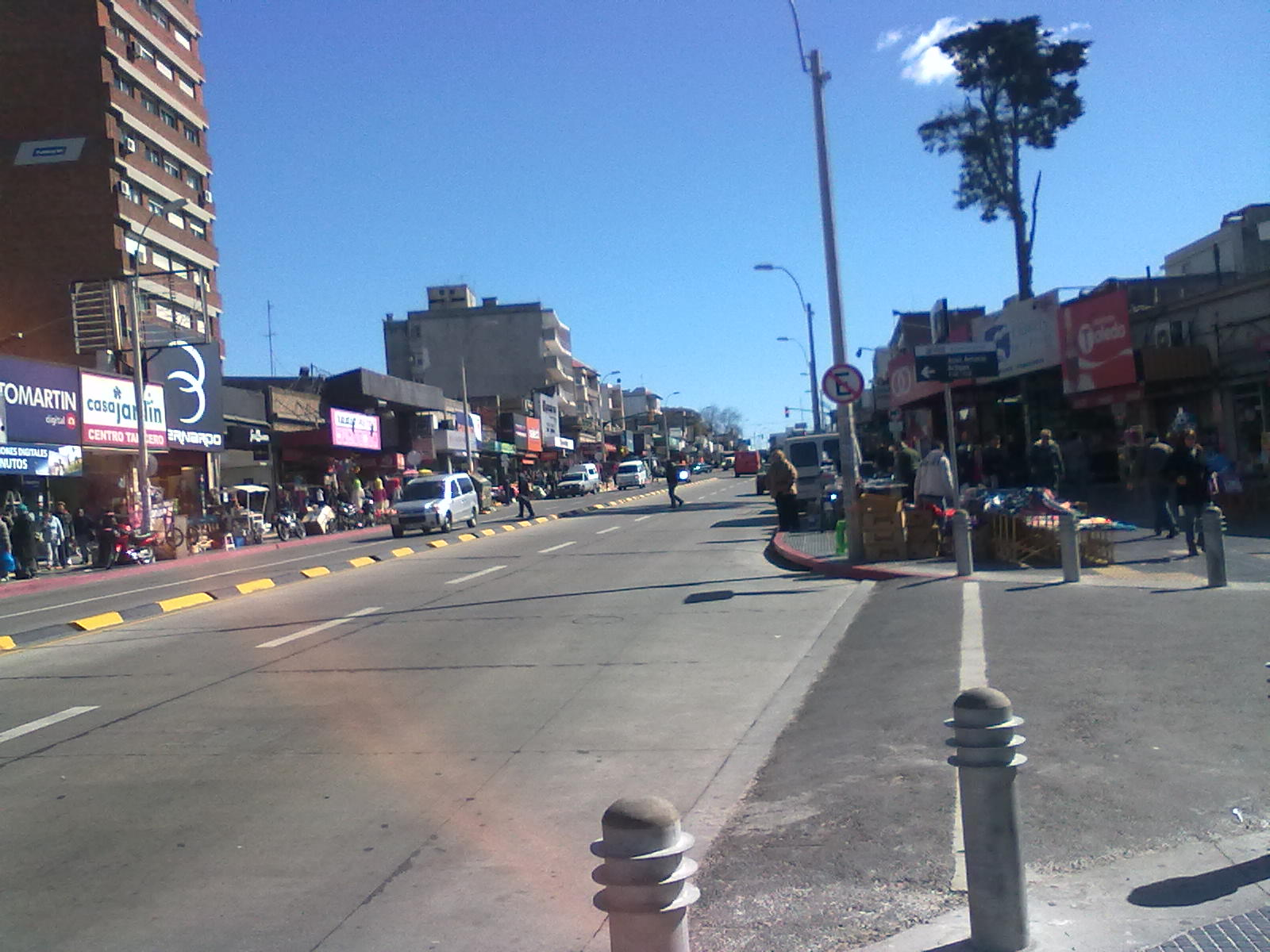 Barrio Paso Molino